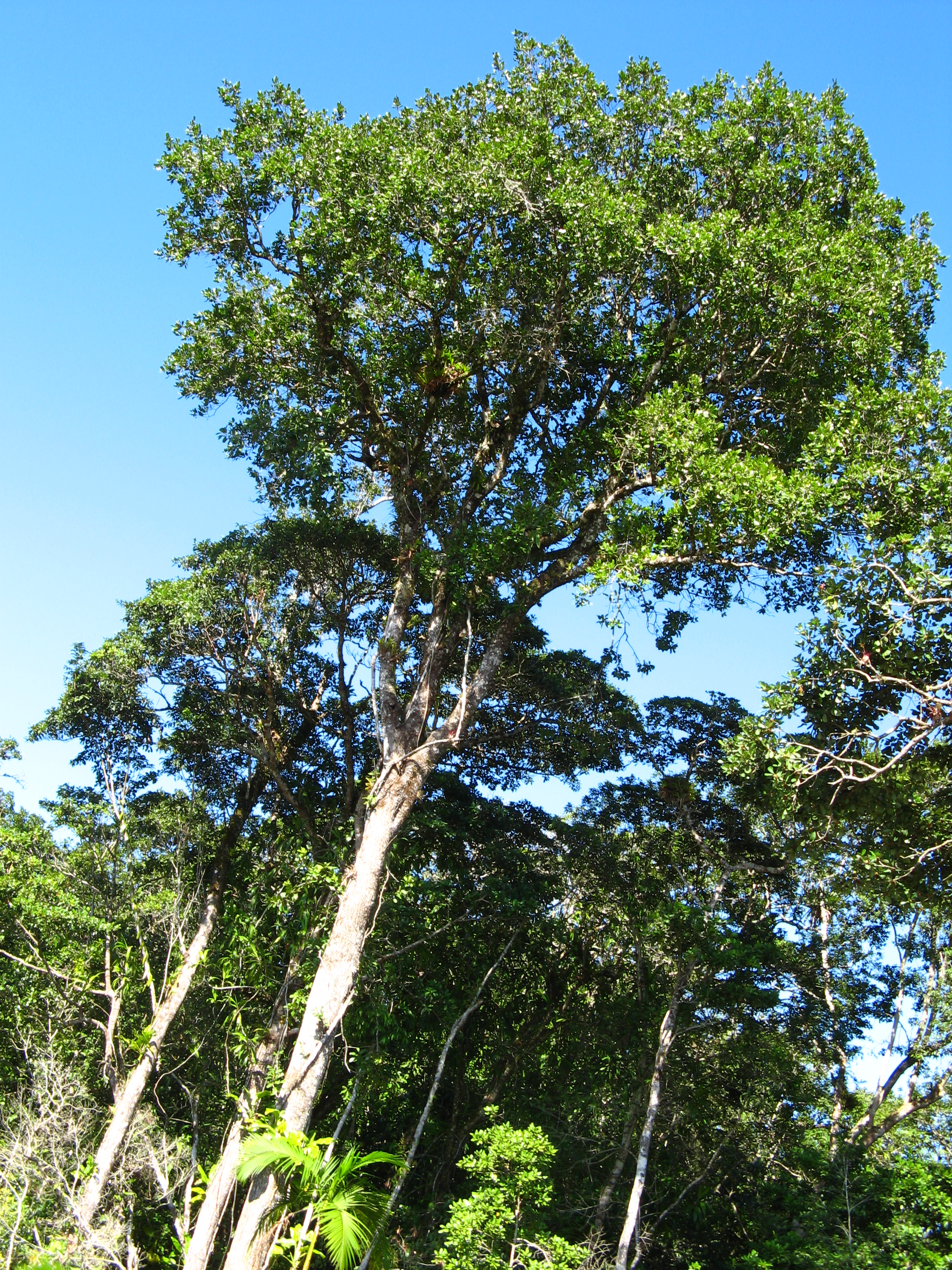 jacareuba